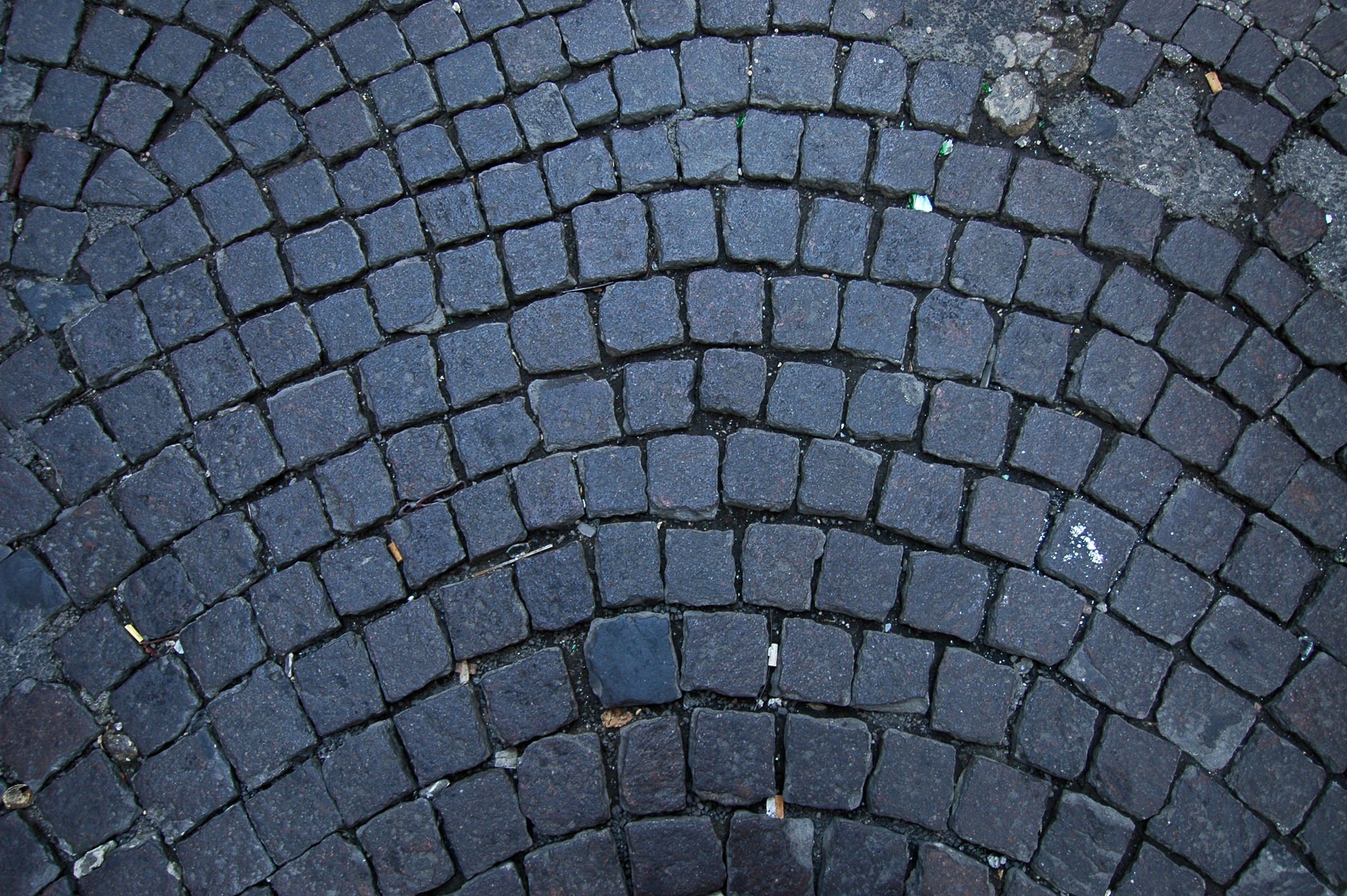 Sampietrini